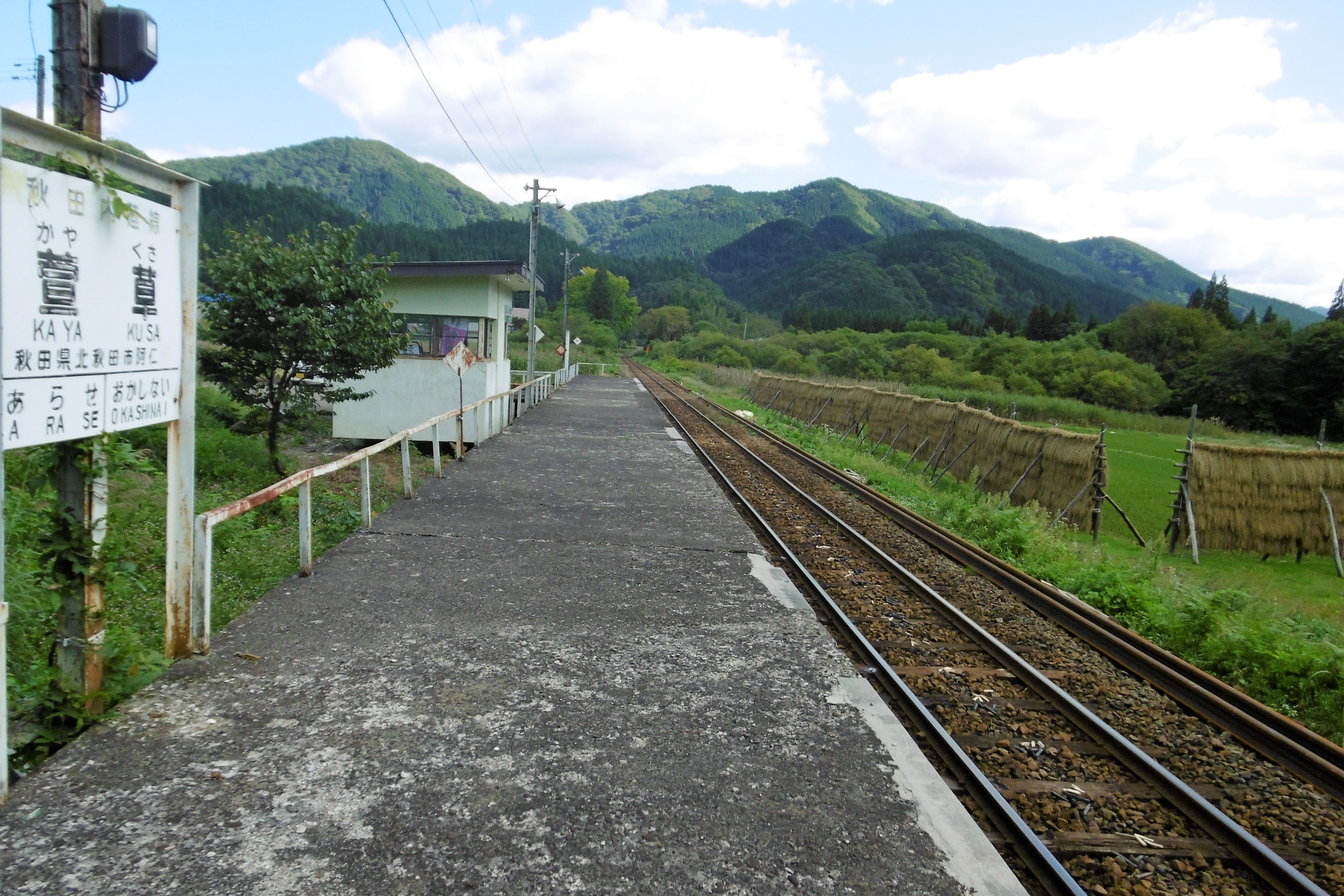 秋田内陸線・萱草駅